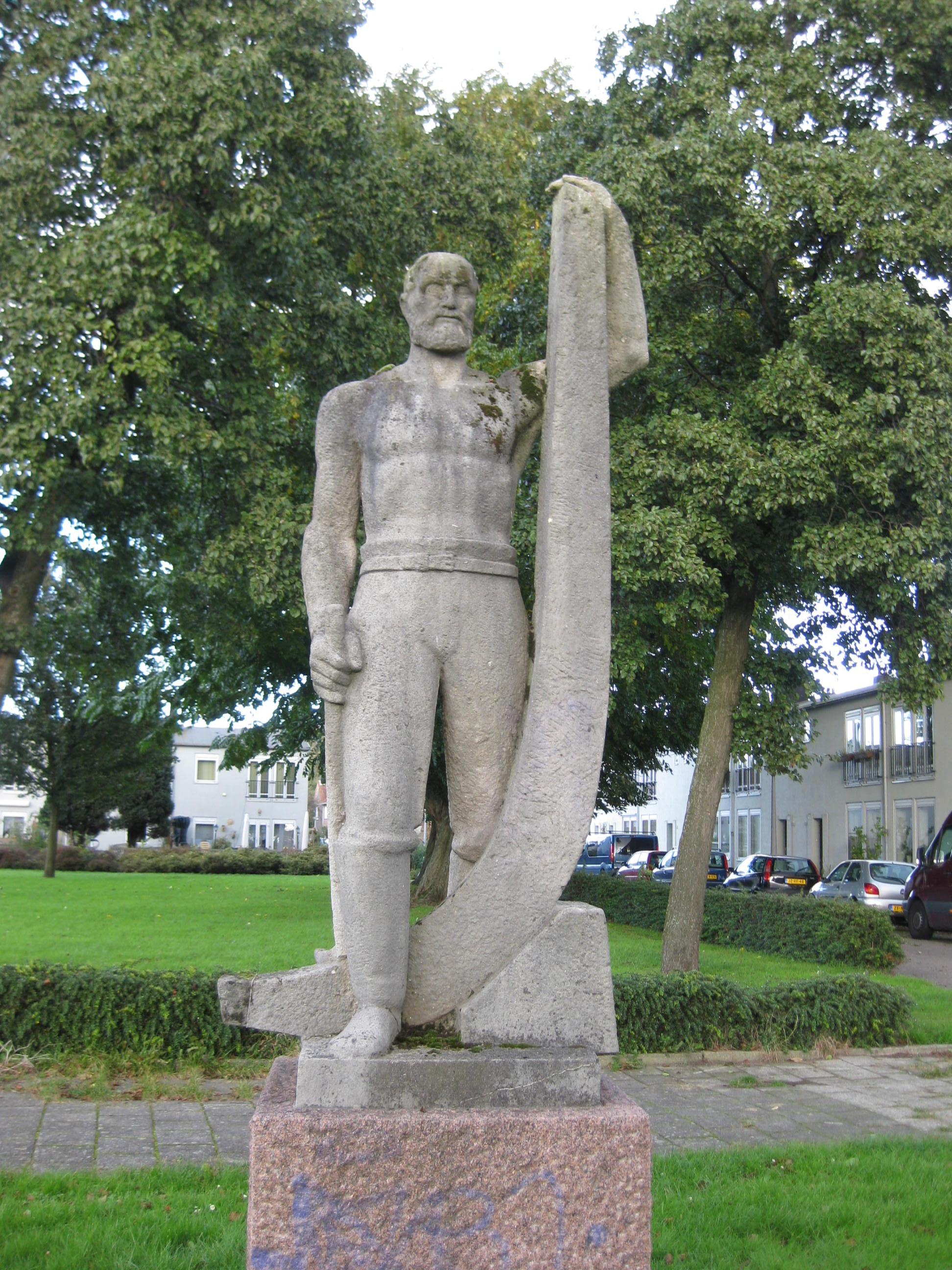 "Scheepstimmerman" sculptuur van Johan Polet uit 1960 op het Enkhuizerplein in Amsterdam-Noord. Schelpkalksteen.